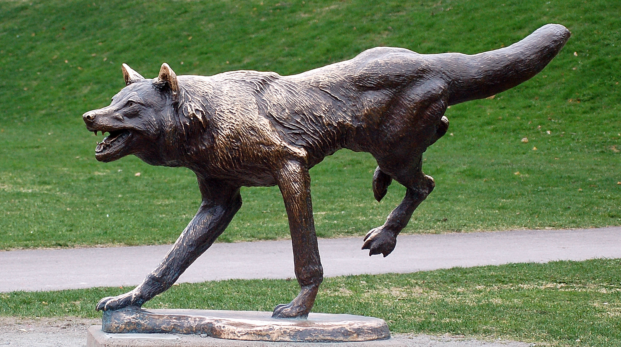 "Varg" Lennart Sand 1999 brons placerad i Marieberg vid stora ingången till Mariebergsskogen Karlstad.